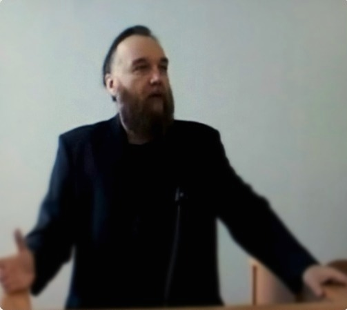 Дугин, Александр Гельевич